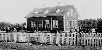 Swedish railway station Lidhult, Halmstad-Bolmens Järnväg